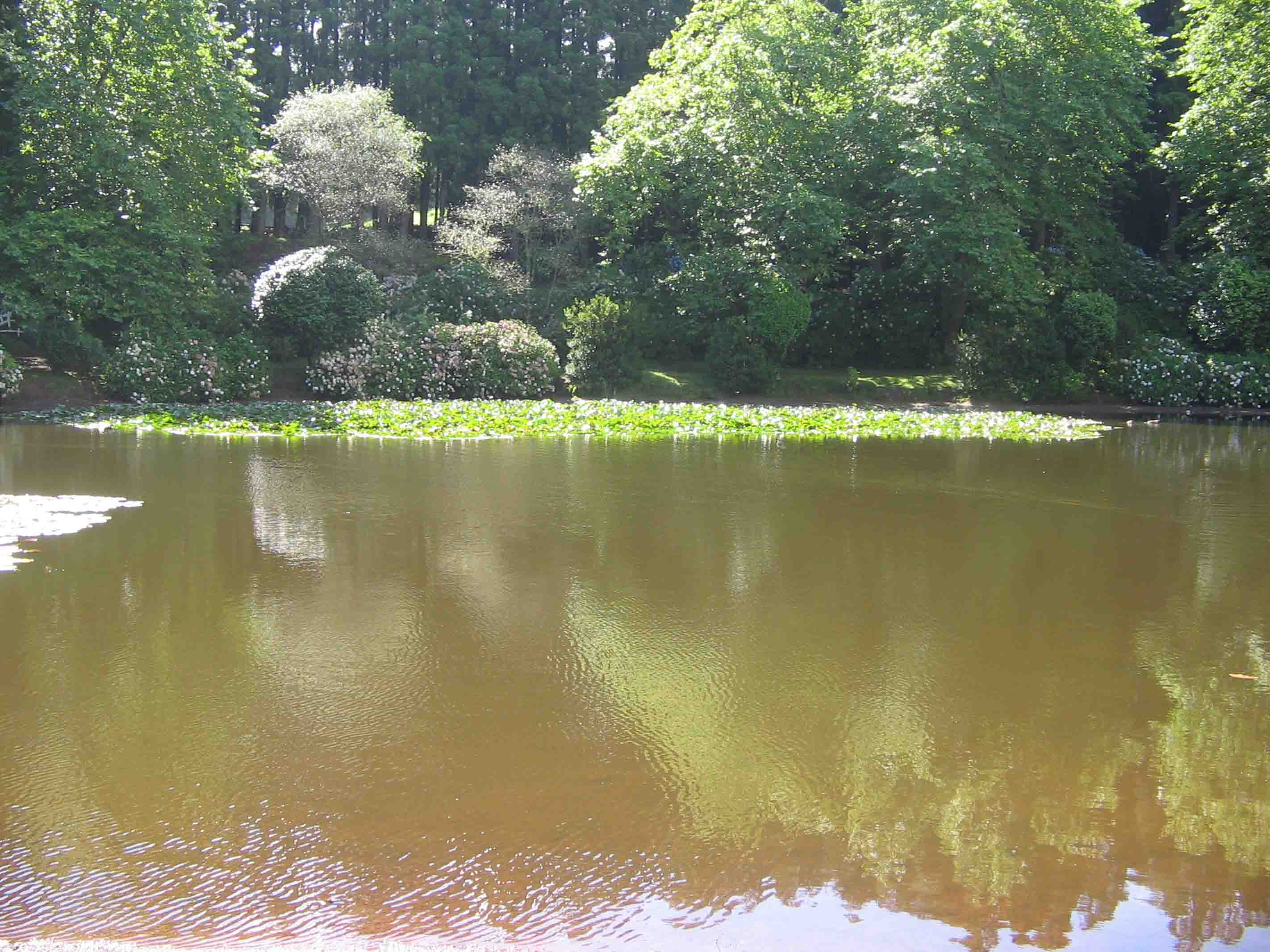 Lagoa das Patas ou da Falca, Verão, Angra do Heroísmo, ilha Terceira, Açores, Portugal.